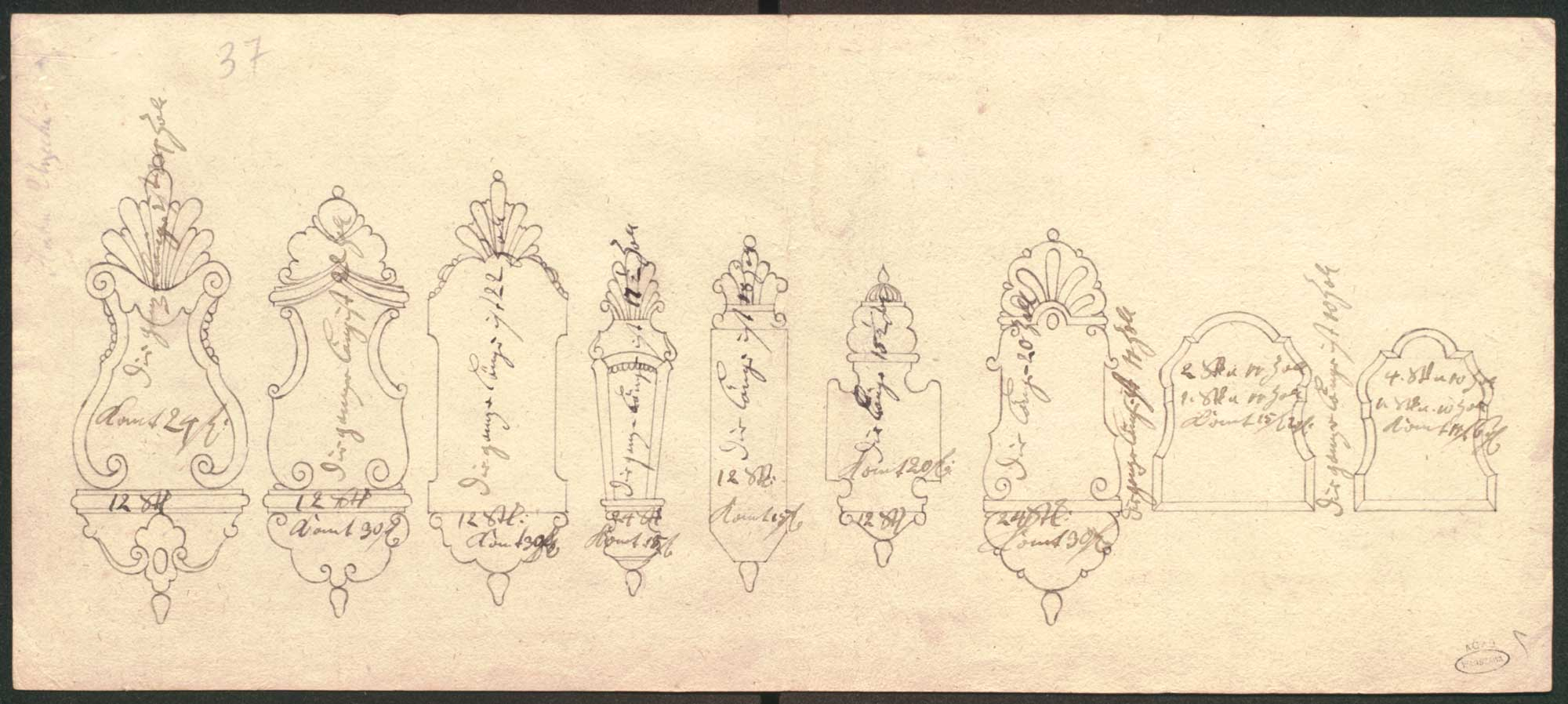 Эскизы зеркал изготавливаемых Уречской мануфактурой Радзивилов в 1-ой половине XVIII века